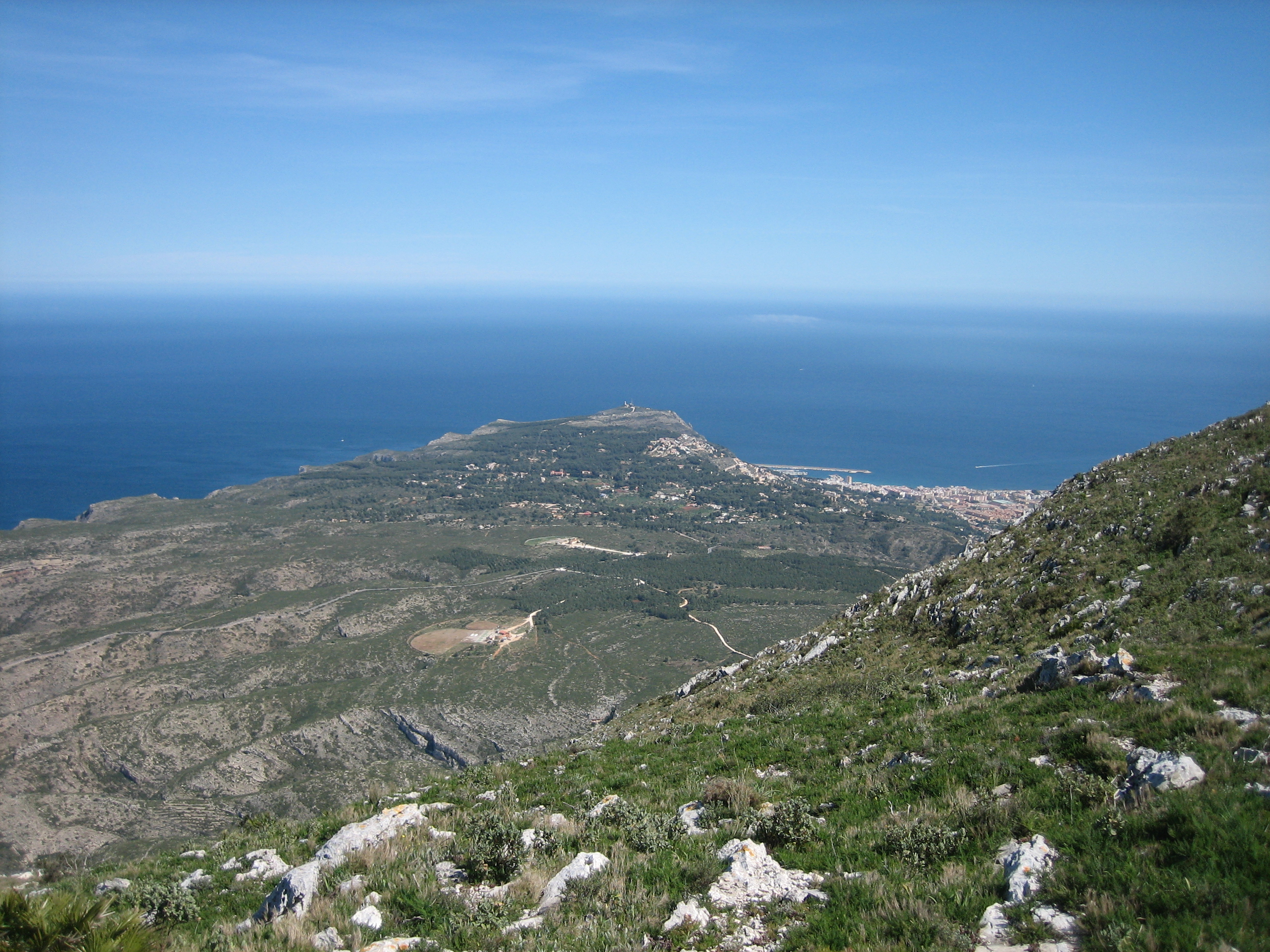 Fotografía del Cabo de San Antonio realizada desde la ladera este del Montgó, en la costa norte de la provincia de Alicante, España